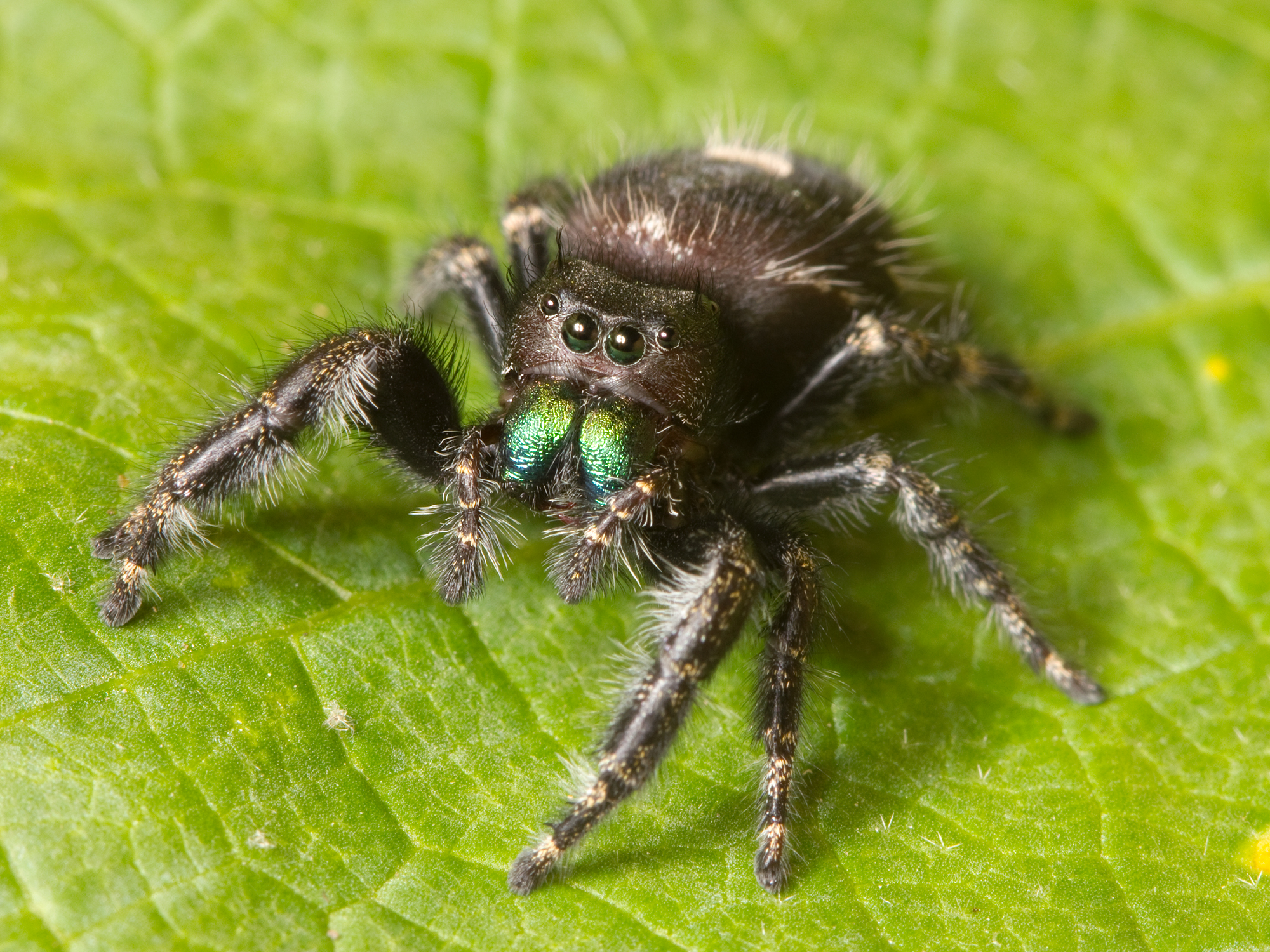 Adult female Phidippus audax jumping spider in Nashville, Tennessee